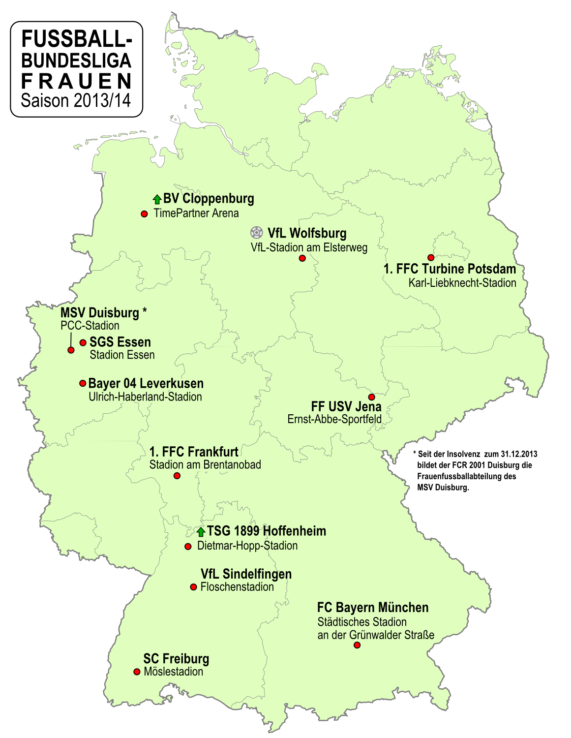 Karte der Vereine der Frauen Fußball-Bundesliga-Saison 2013/2014